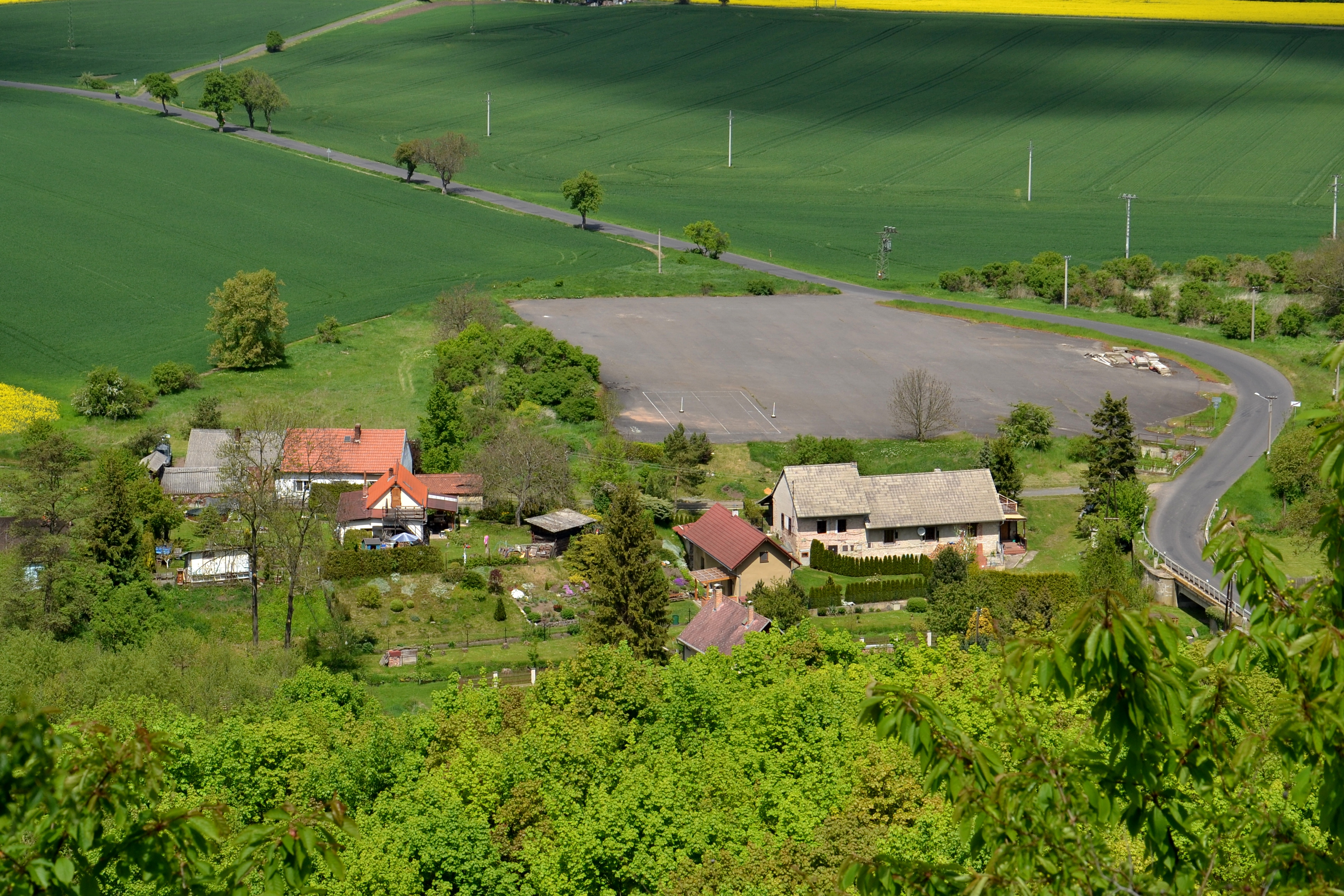 Dolánky – pohled z vrchu Rubín